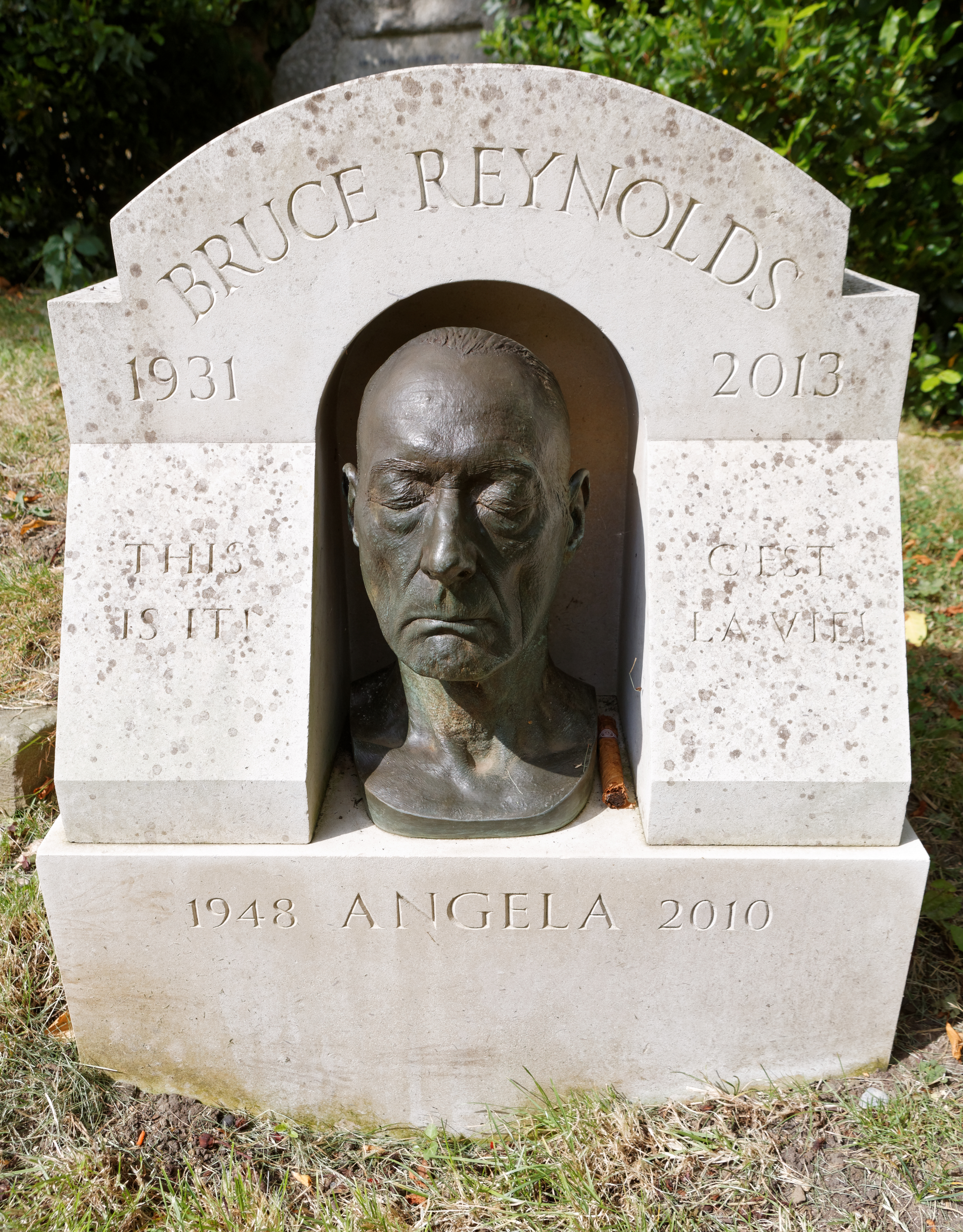 Sépulture de Bruce Reynolds (1931-2013), criminel britannique, connu pour avoir été le cerveau de l'attaque du train postal Glasgow-Londres.